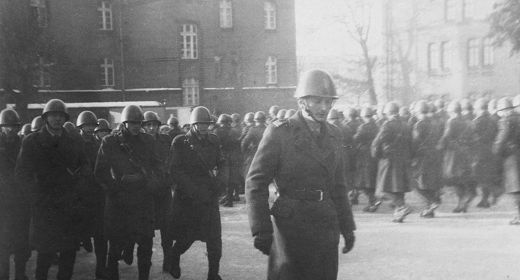 Pododdział w przemarszu na przysięgę - Ośrodek Szkolenia Górnośląskiej Brygady WOP w Prudniku